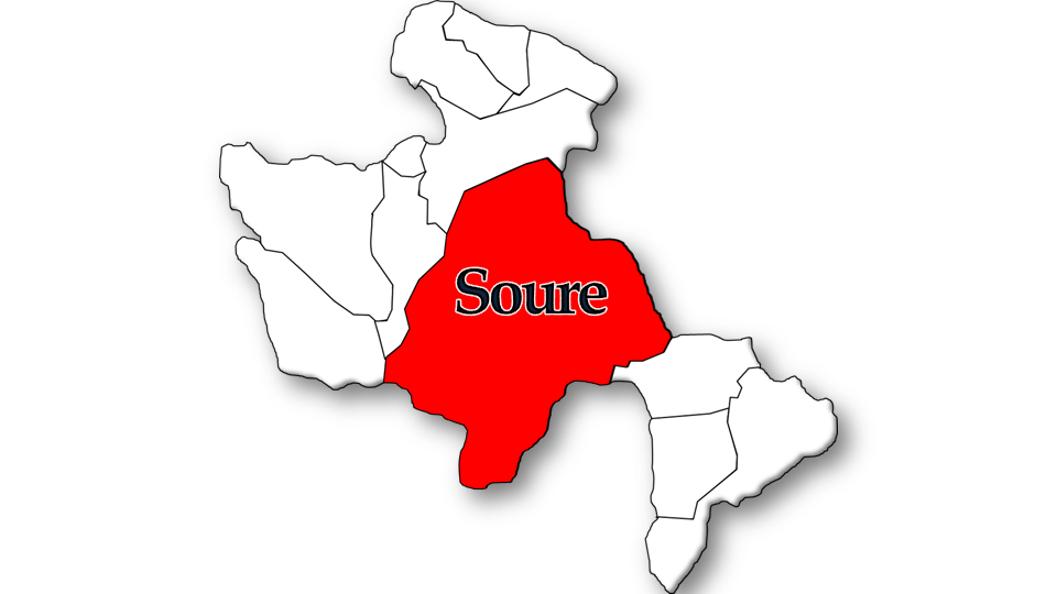 População